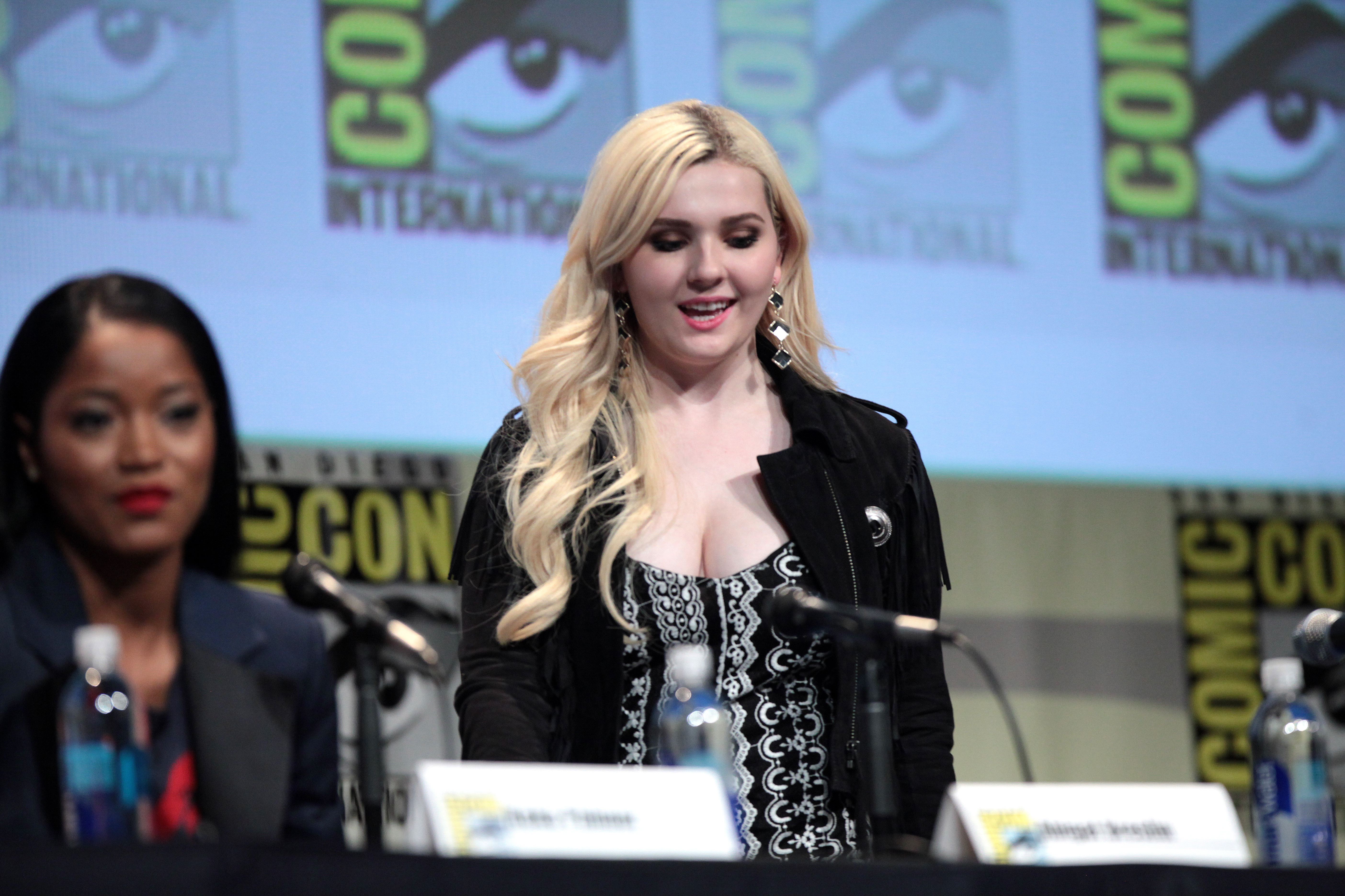 The actress Abigail Breslin at San Diego ComicCon in 2015